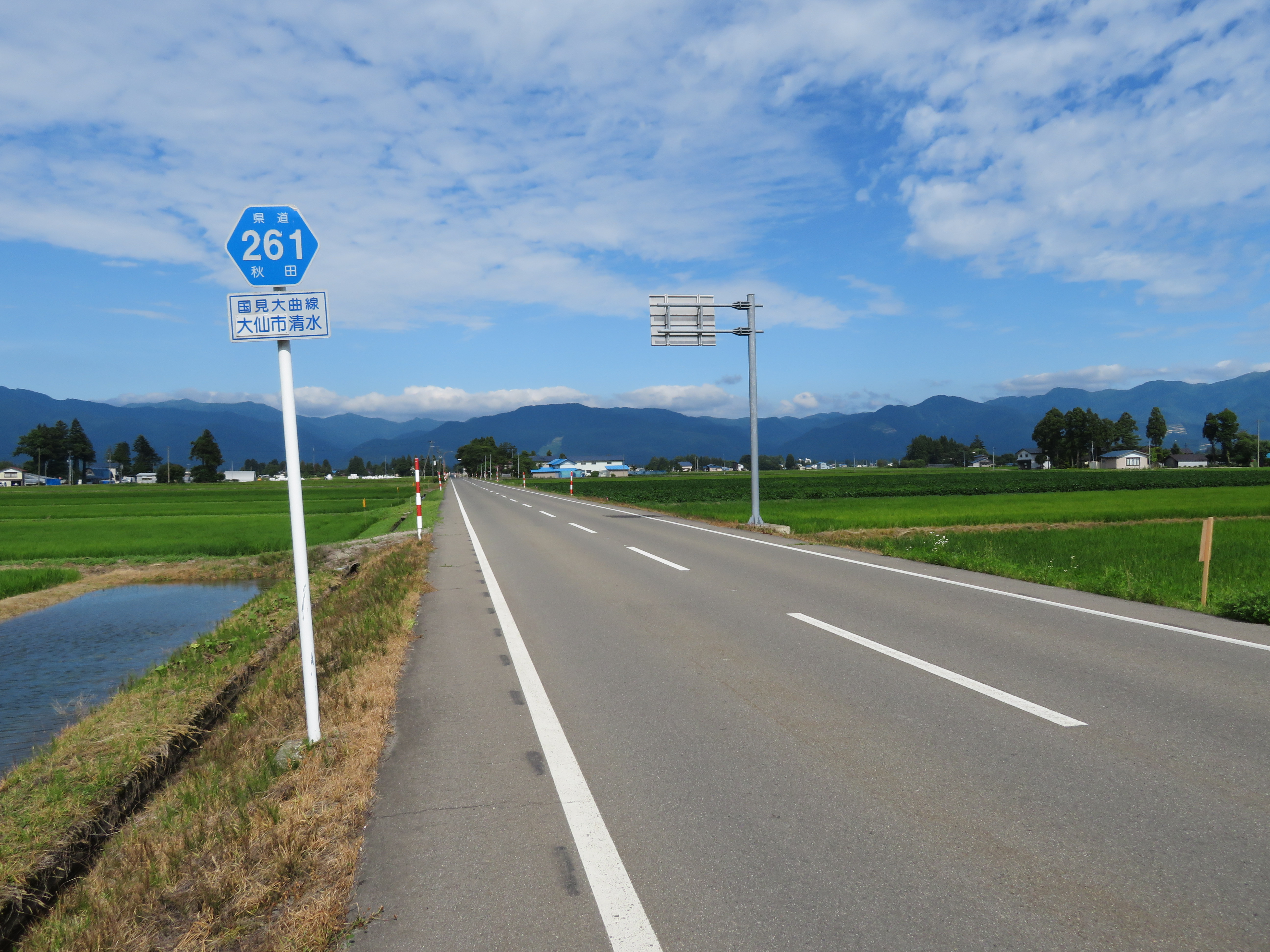 秋田県道261号線大仙市清水付近